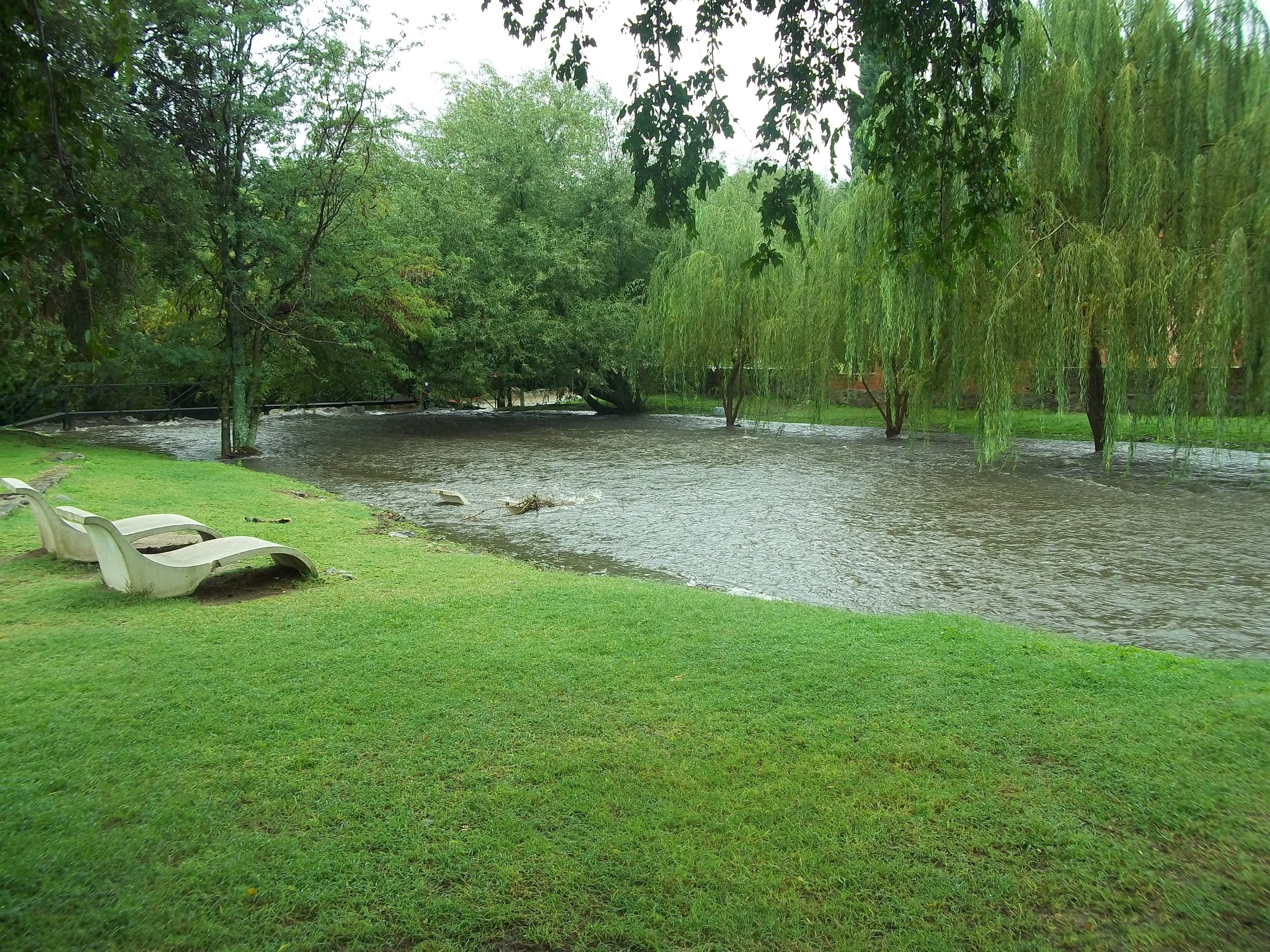 luego de las lluvias de febrero